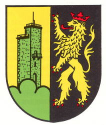 Wappen von Föckelberg